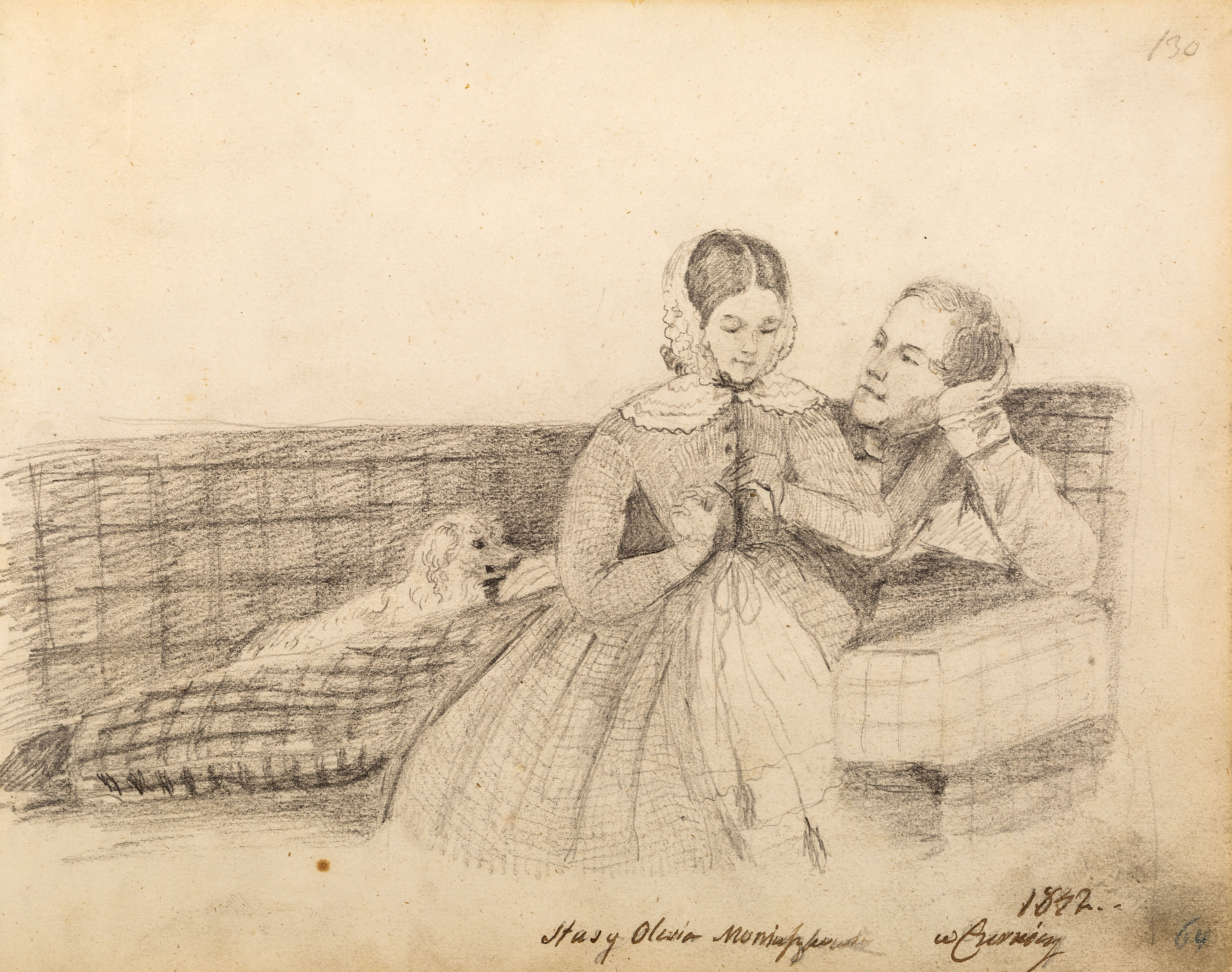 Беларуская (тарашкевіца): Партрэт Станіслава Манюшкі (Stanisłaŭ Maniuška) з жонкай Аляксандрай Мюлер (Alaksandra Müller)